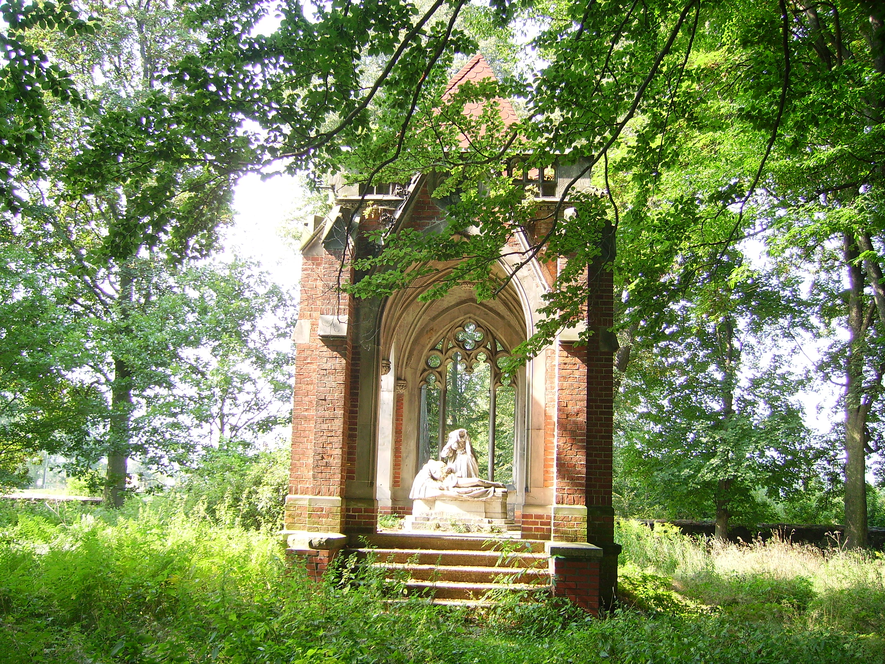 Jałowiec, mauzoleum Karla Roberta von Lachmanna z 1871 roku w parku pałacowym